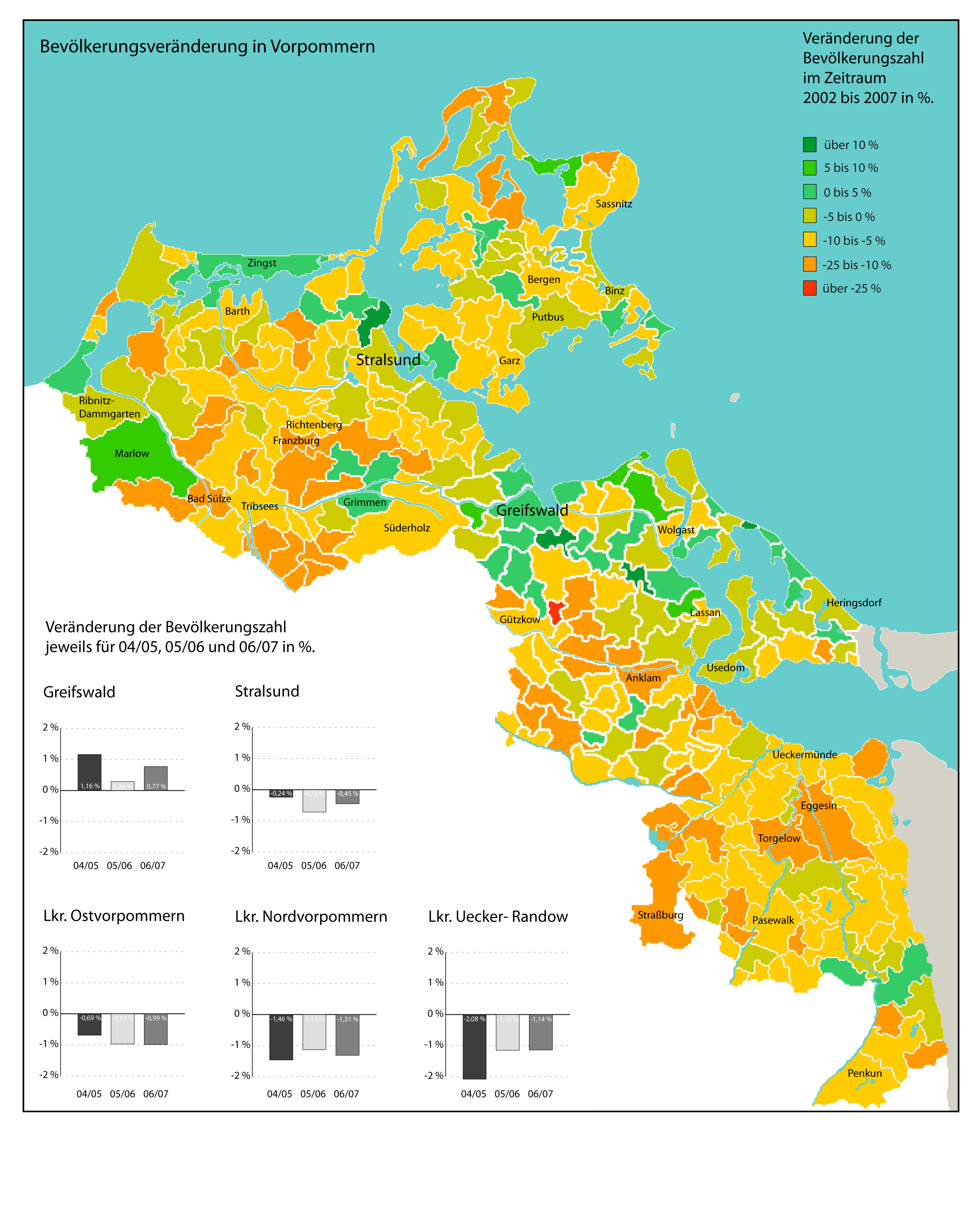 Bevölkerungsveränderung/Bevölkerungsentwicklung in Vorpommern im Zeitraum von 2002 bis 2007